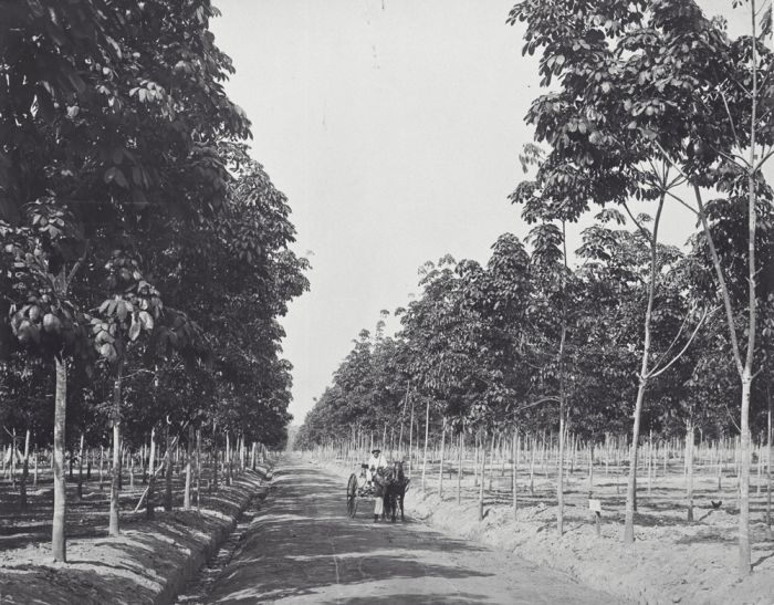 foto. Een planter in een rijtuig tussen de rubberbomen op de onderneming Batang Serangan